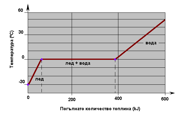 Специфична топлина на топене